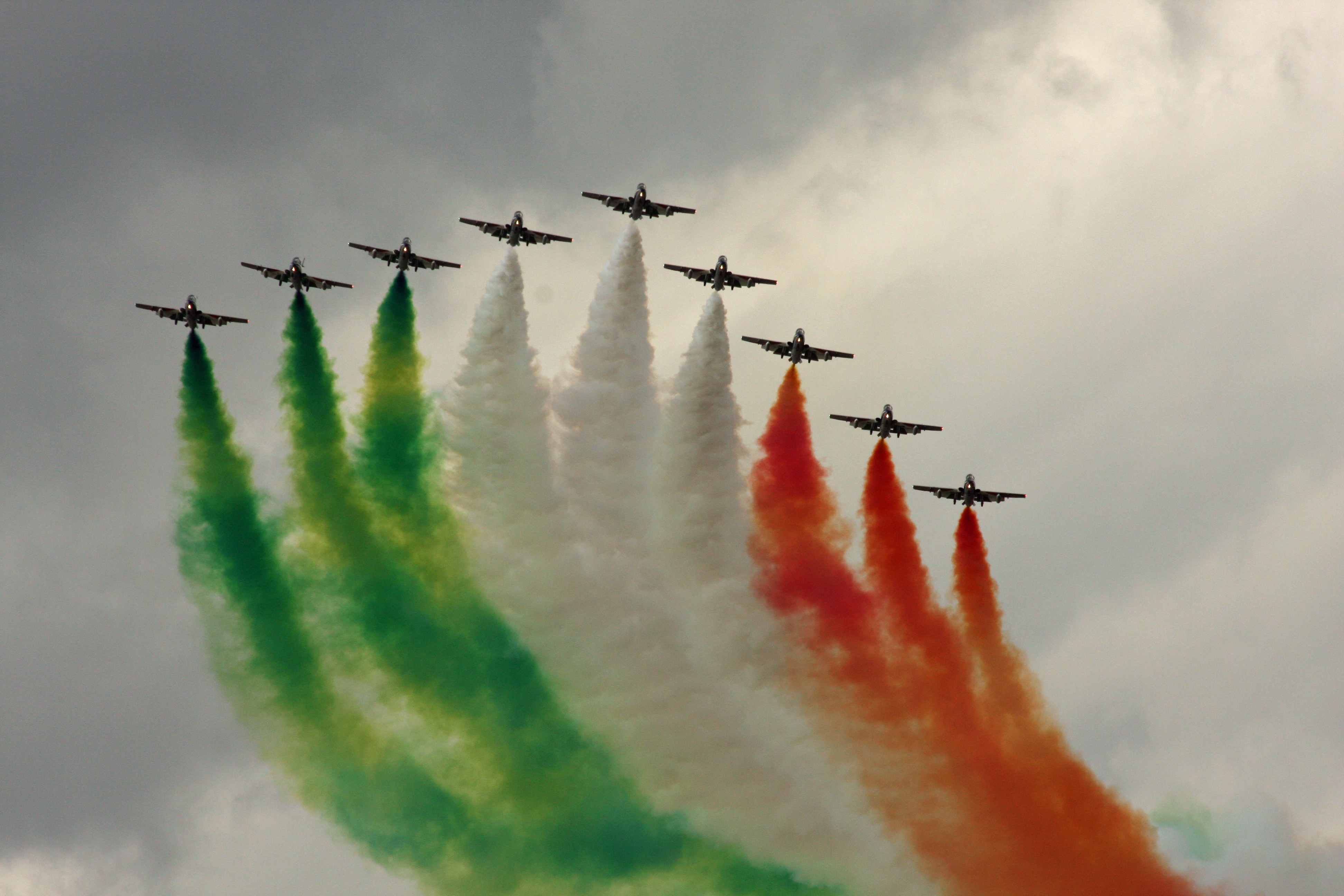 Frecce Tricolori 12